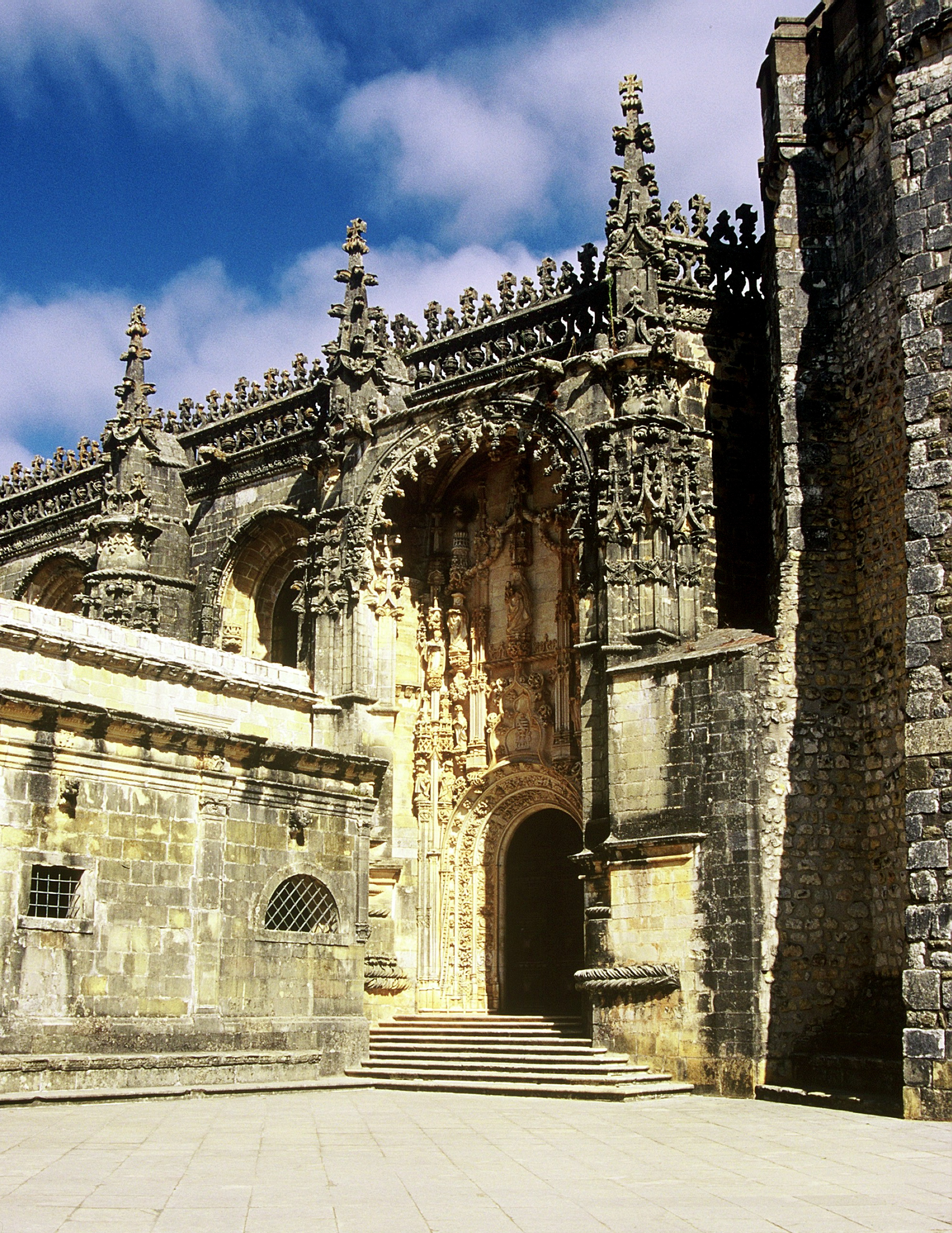 Castello di Tomar. Portogallo